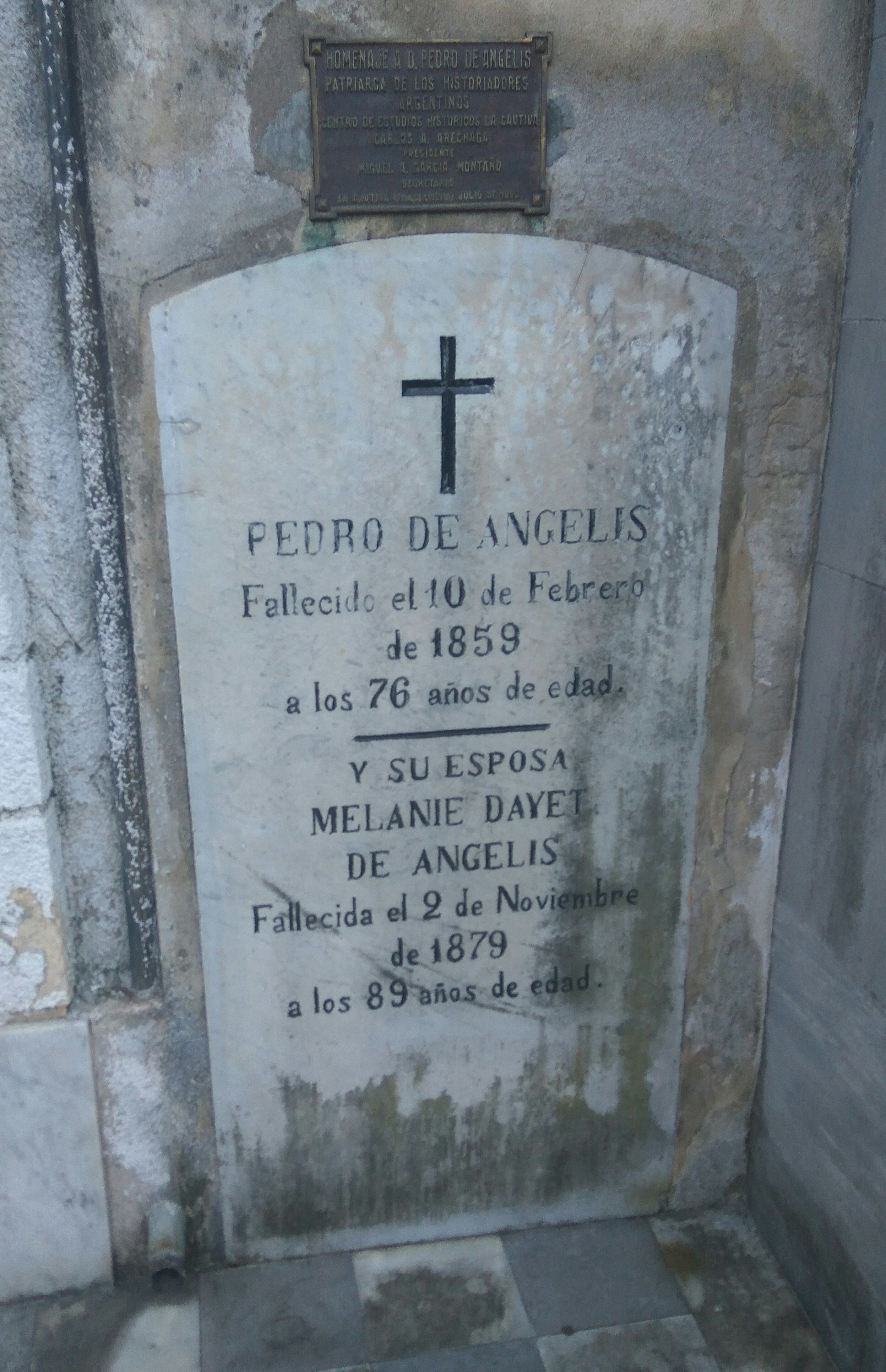 Tumba del historiador Pedro de Angelis (1784 - 1859) en el Cementerio de la Recoleta.